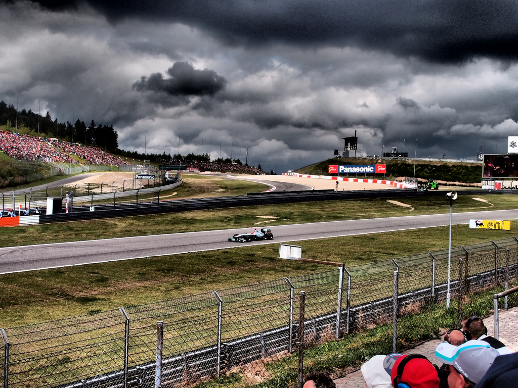 nurburgring 2011 schumacher